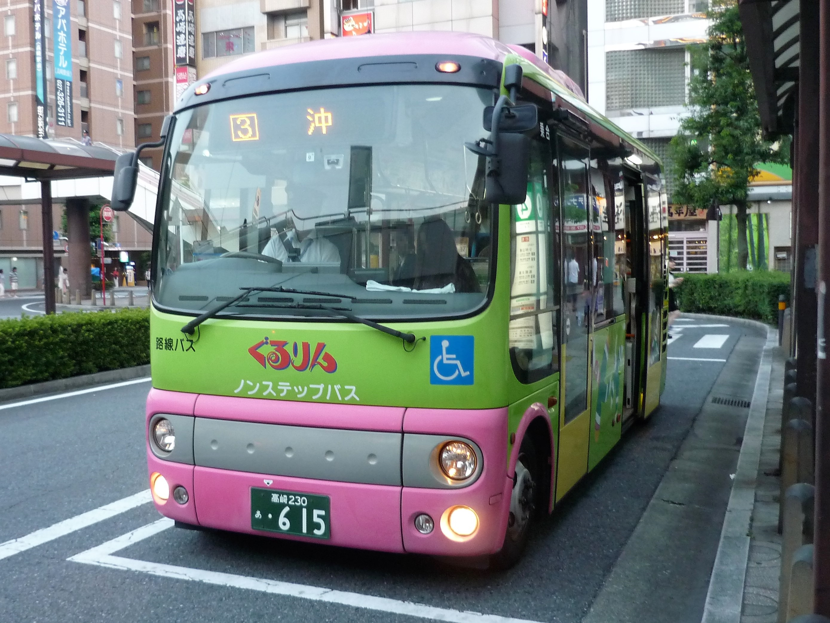 高崎市内循環バスぐるりん・高経大線（高崎駅前にて） Panasonic Lumix DMC-FS3